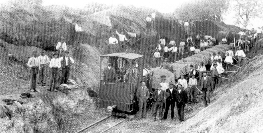 Bau der Almtalbahn Template:Benutzer:Hufi/Bild-alt